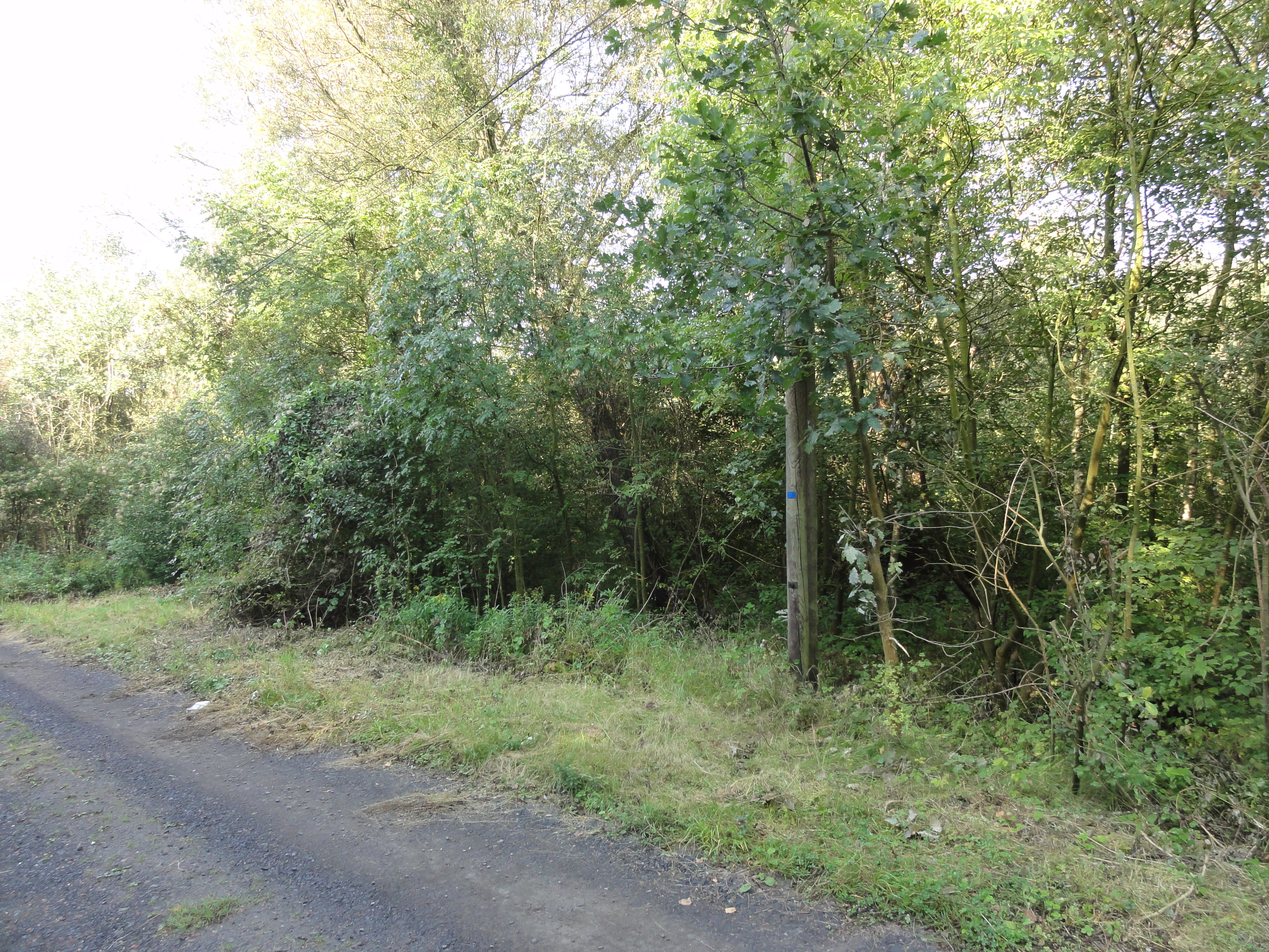 Terril n° 180 dit Remblais Petit Diable, Fosse Thiers de la Compagnie des mines d'Anzin, Onnaing, Nord, Nord-Pas-de-Calais, France.